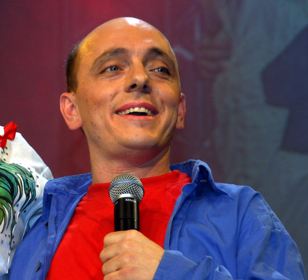 Bernhard Hoëcker, deutscher Schauspieler, Komödiant und Moderator beim Benefiz-Konzert Cover me in Köln